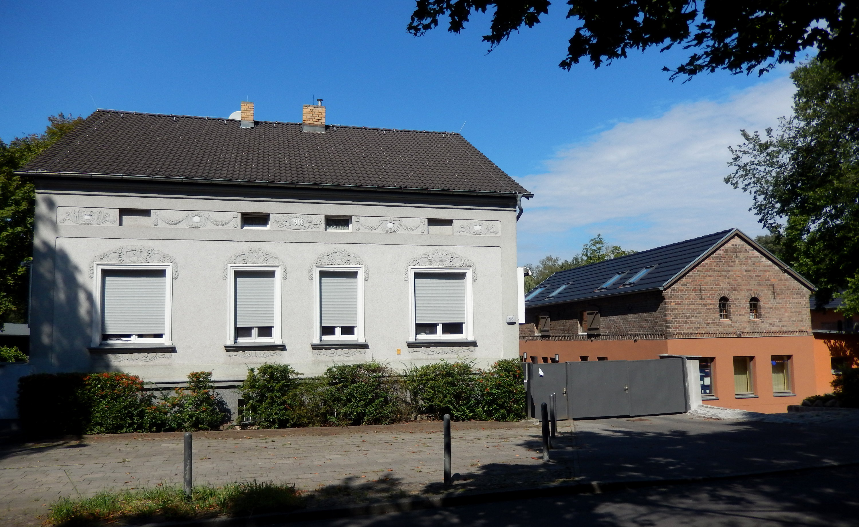 Gehöft Alt-Buch 53 in Berlin-Buch, letzter komplett erhaltener Vierseithof im Ortsteil, ursprünglich der Kossäten­familie Damerow/Besch gehörig, heutige Gebäude zirka zwischen 1890 und 1930 erbaut